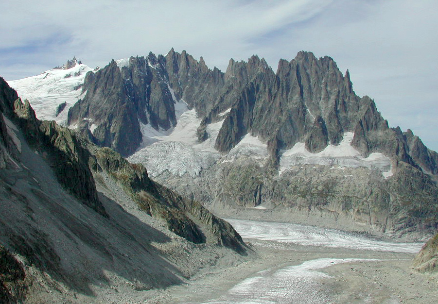 Envers des Aiguilles de Chamonix (versant SE, dominant le Mer de Glace). Photo R. Lacassin